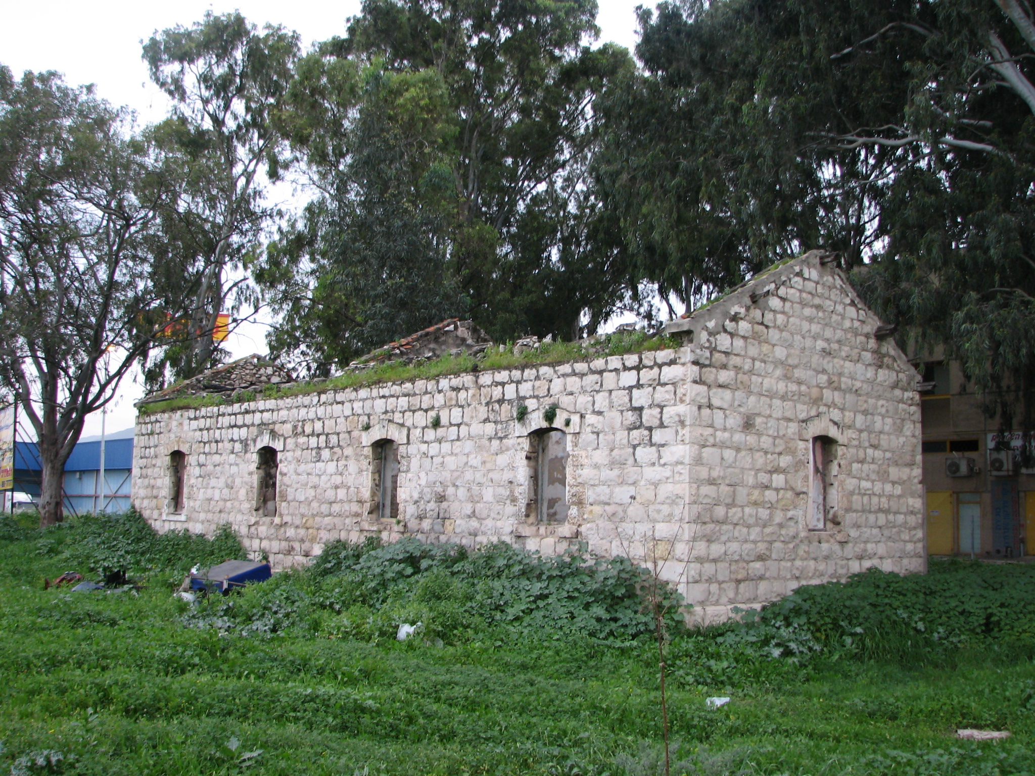 Valley train 4.5km station רכבת העמק - תחנה 4.5 נמצאת בעיר נשר ליד המרכז המסחרי שמול שכונת בן דור תחנה ק"מ 4.5 מבט לכוון דרום מהמסילה